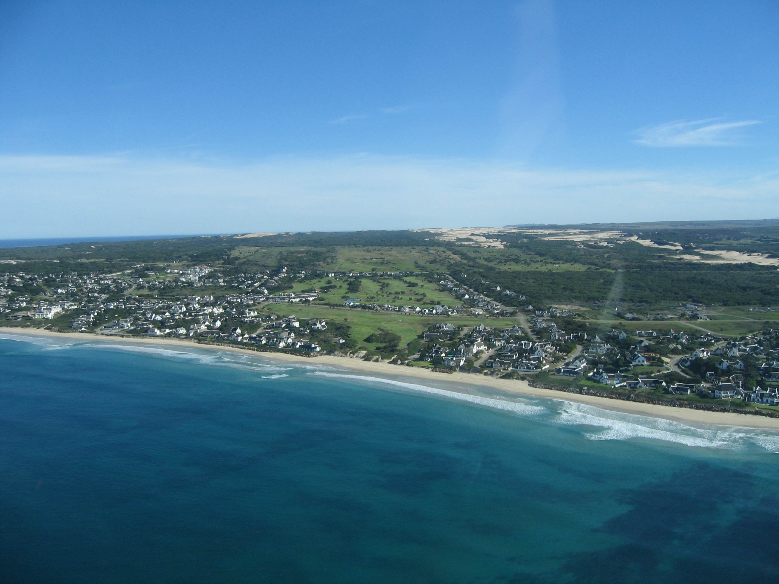 Foto gemaakt door m'n pa vanuit een vliegtuigje...